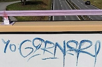 Jo Gerner, sogenanntes Calligraffiti 2019